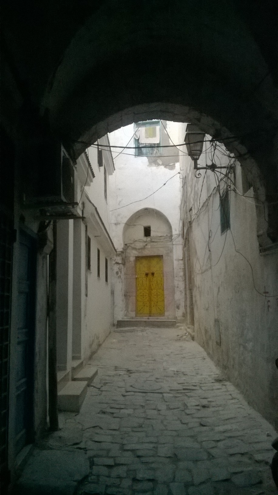 La médina de Tunis مدينة تونس العتيقة